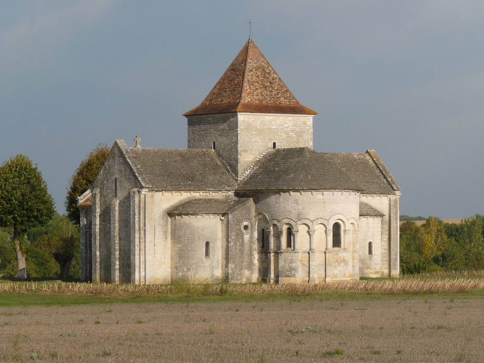 l'église de Lichères, Charente, France